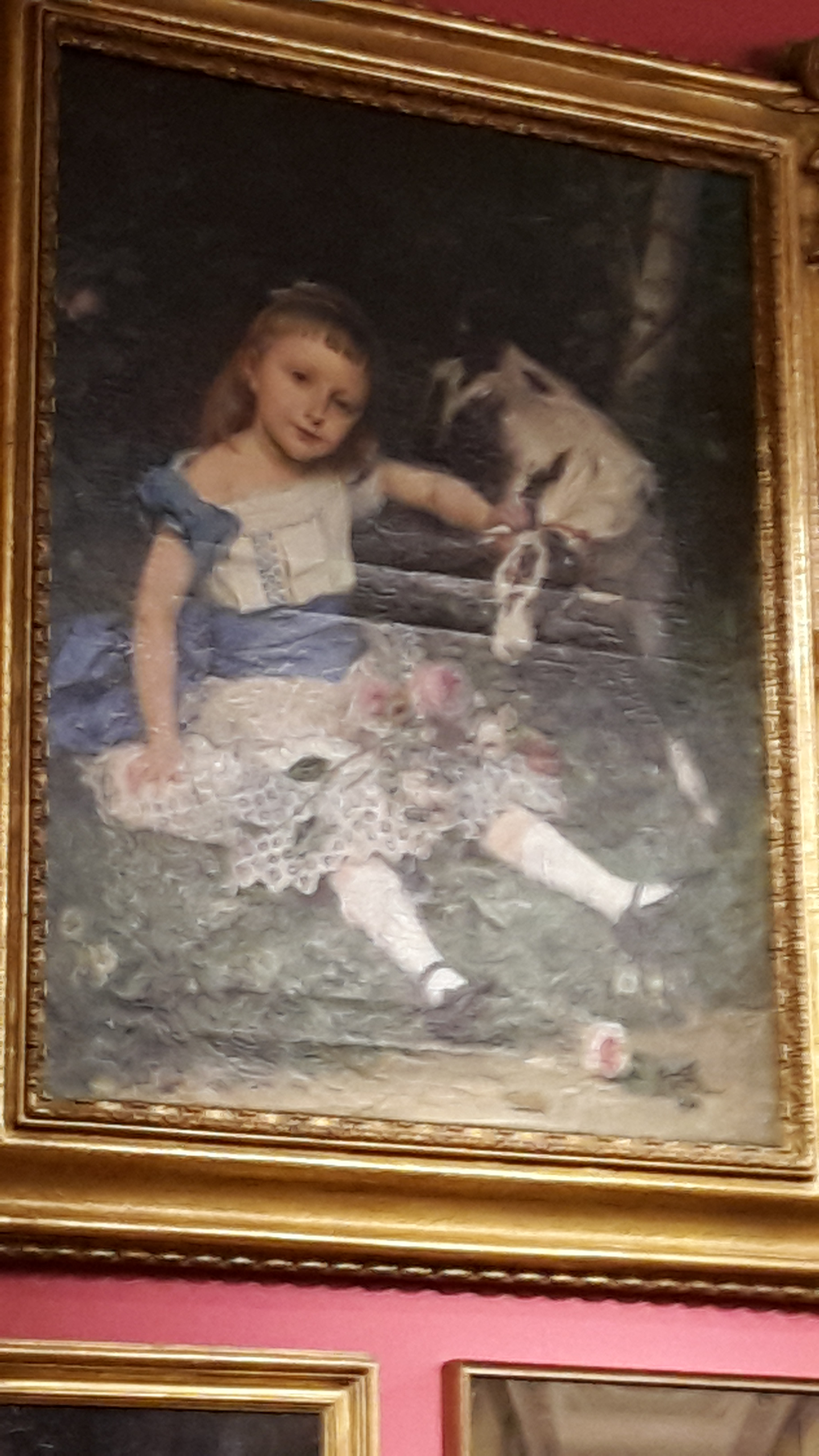 Contessina Bice Barbiano di Belgiojoso (1876), ritratto di Giuseppe Bertini conservato alla Galleria d'arte moderna di Milano (GAM)